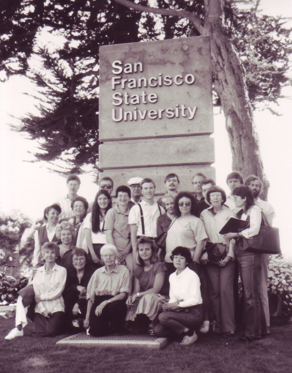 iuj partoprenantoj de la Nord-Amerika Somera Kursaro ĉe SFŜU en 1990